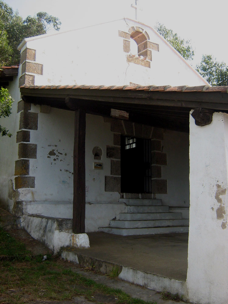 Ermita Talako Ama, en Ea (Vizcaya)